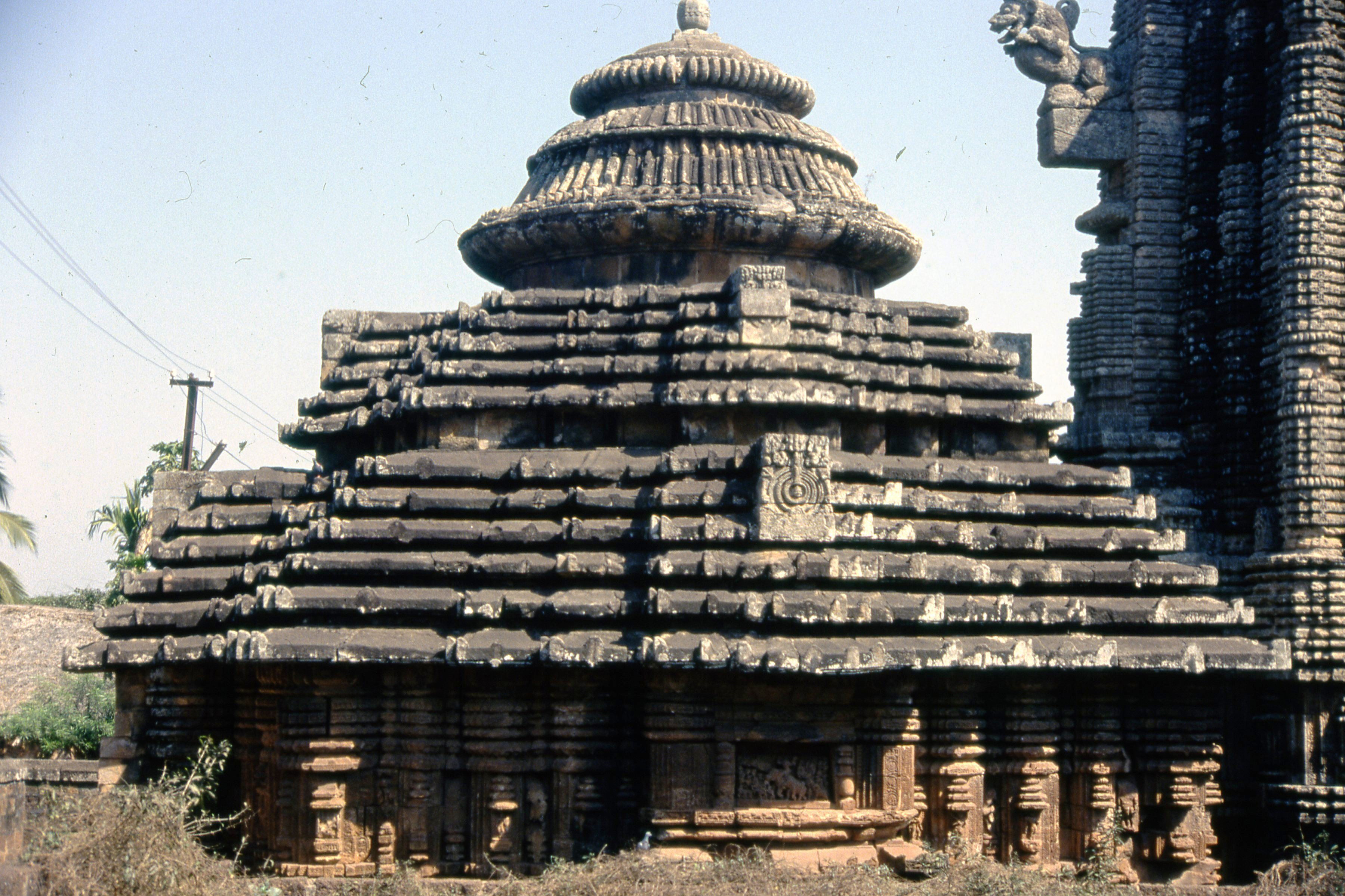 Detalle de un Ghanta (campana) doble. Bhuvanesvar, Orissa, India.